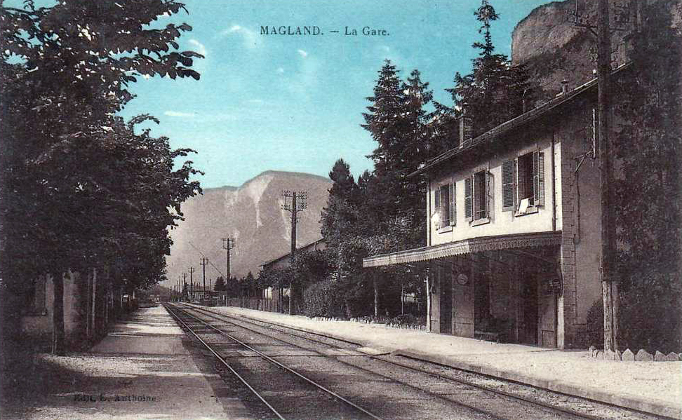 Intérieur de la gare de Magland au temps de la vapeur.